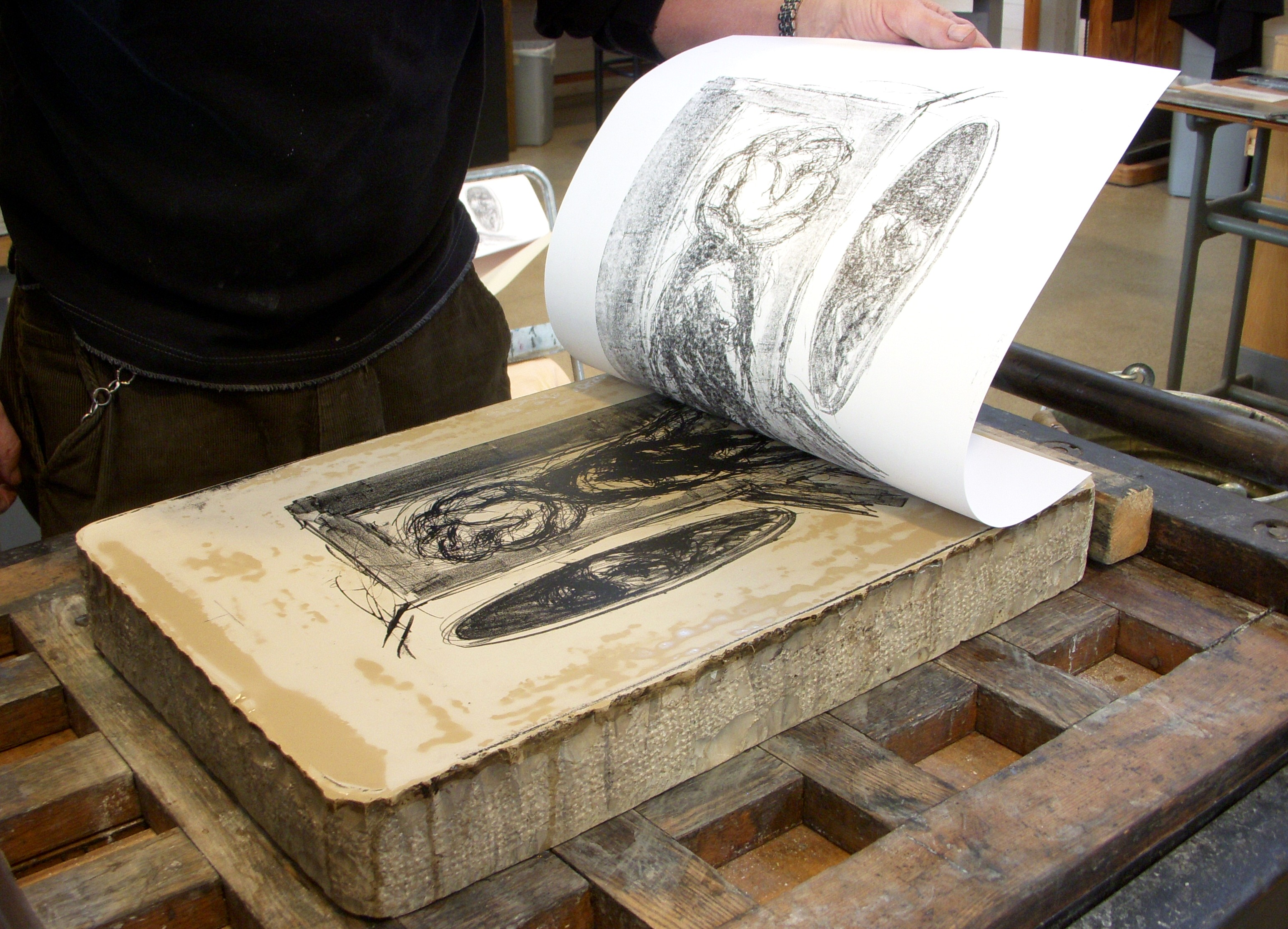 Litografiska museet vid Sundby Gård i Huddinge kommun